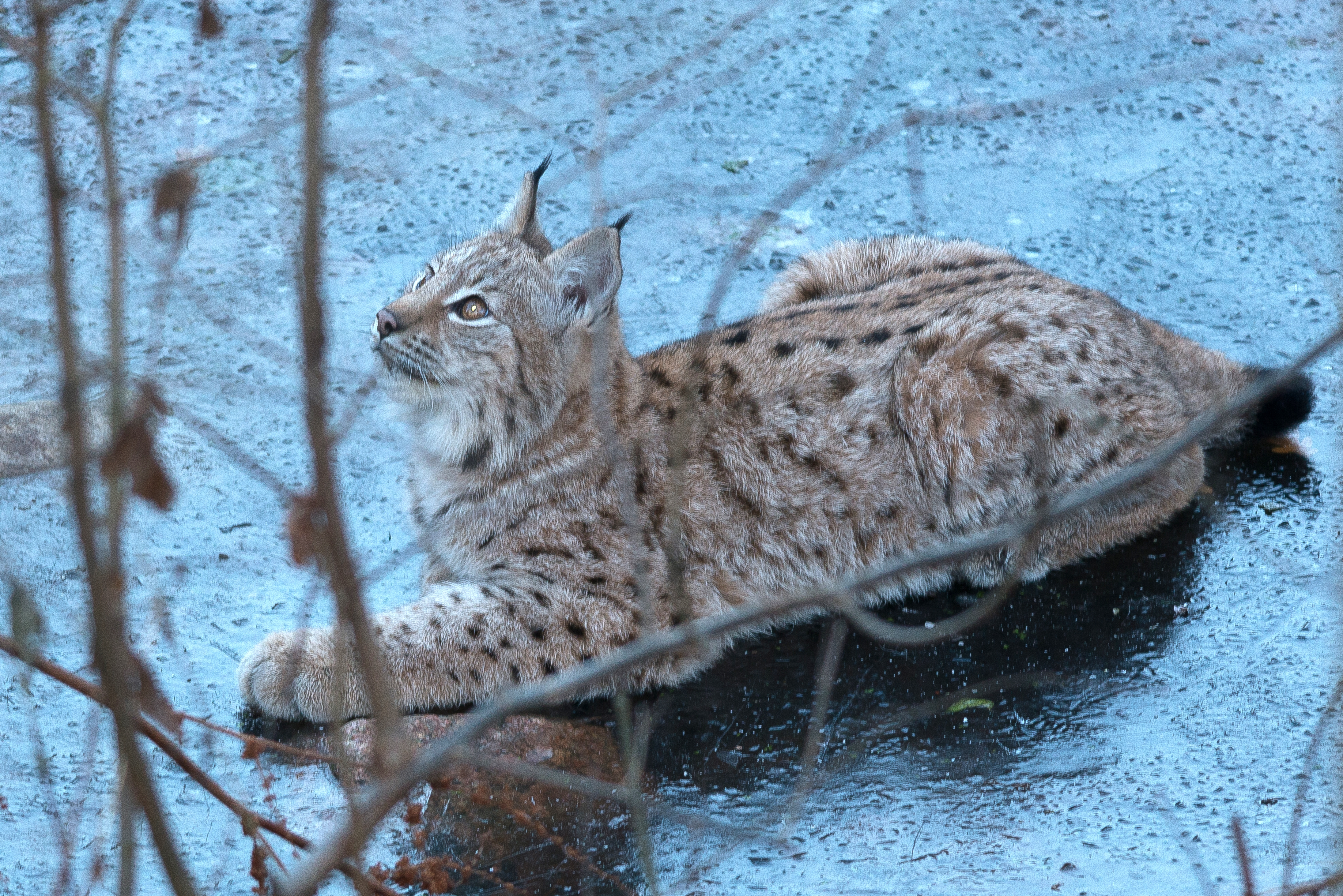 Lodjur, Lynx, Lynx lynx, Skansen Stockholm